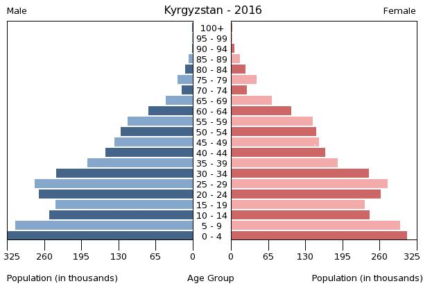 A population pyramid illustrates the age and sex structure of a country's population and may provide insights about political and social stability, as well as economic development. The population is distributed along the horizontal axis, with males shown on the left and females on the right. The male and female populations are broken down into 5-year age groups represented as horizontal bars along the vertical axis, with the youngest age groups at the bottom and the oldest at the top. The shape of the population pyramid gradually evolves over time based on fertility, mortality, and international migration trends.